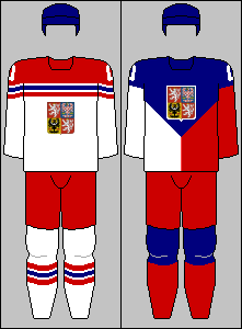 Czech Republic national team jerseys from Winter Olympic Games 2014 and World Championship 2014